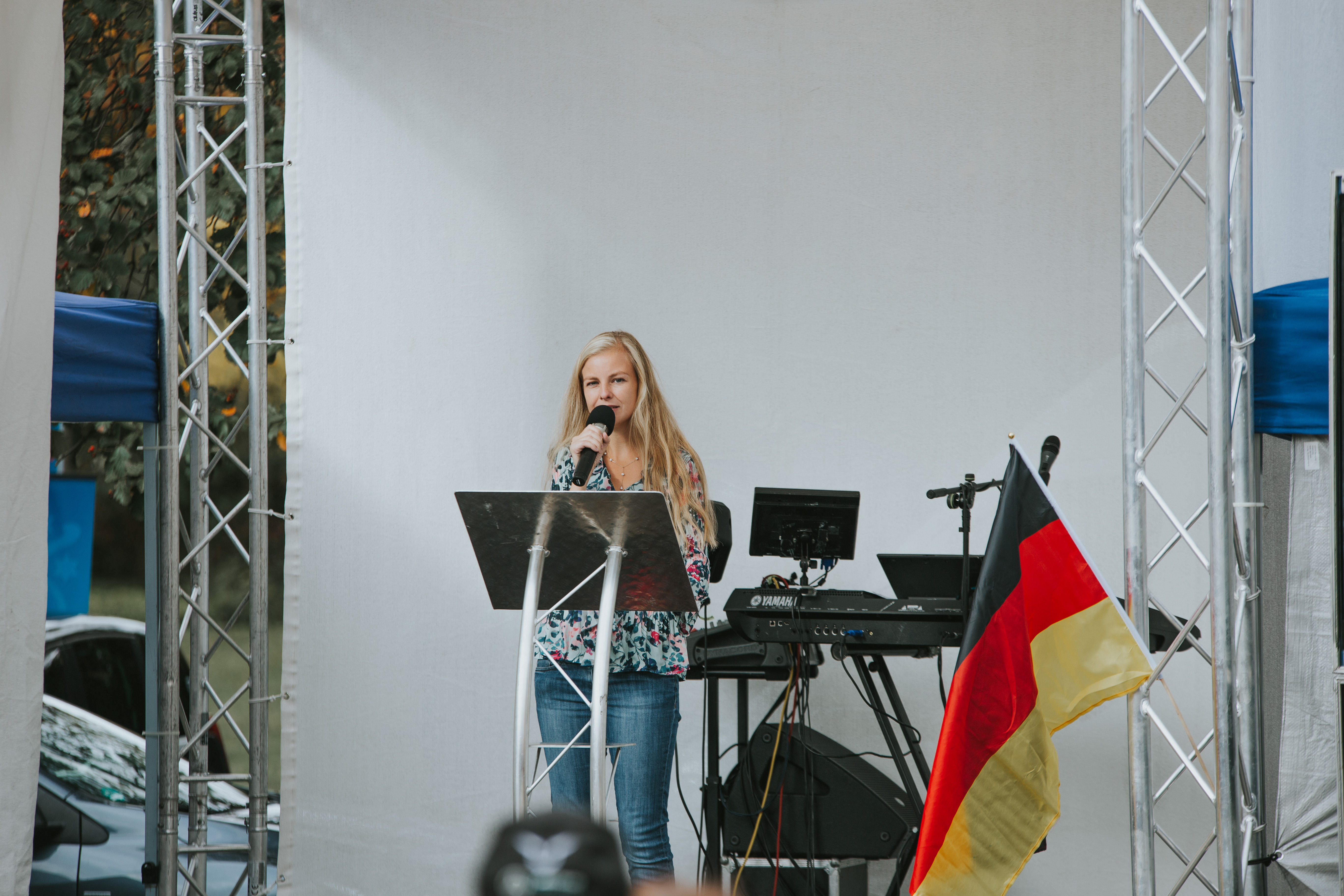 Landtagsabgeordnete Wiebke Muhsal auf einer Wahlkampfveranstaltung der AfD zur Thüringer Landtagswahl 2019 in Nordhausen